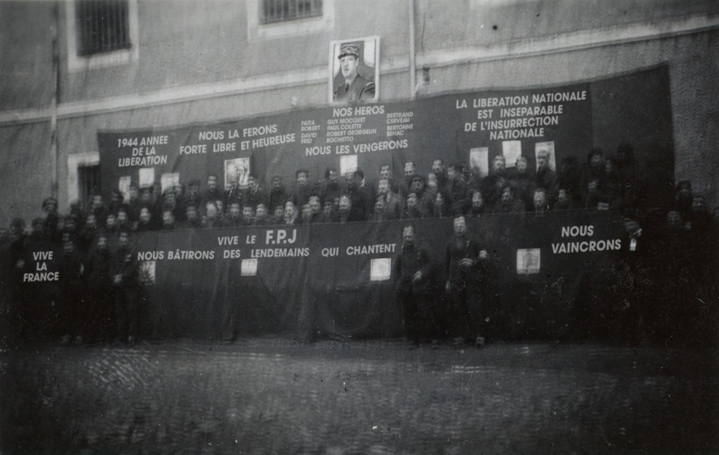 Cette tribune vantant la force et l'unité de la Résistance sous le portrait du général De Gaulle regroupe des responsables du Collectif des détenus résistants de la Centrale d'Eysses organisateur d'une "fête de la jeunesse" dans la prison le 16 janvier 1944, transformée manifestation patriotique, unitaire et combative.